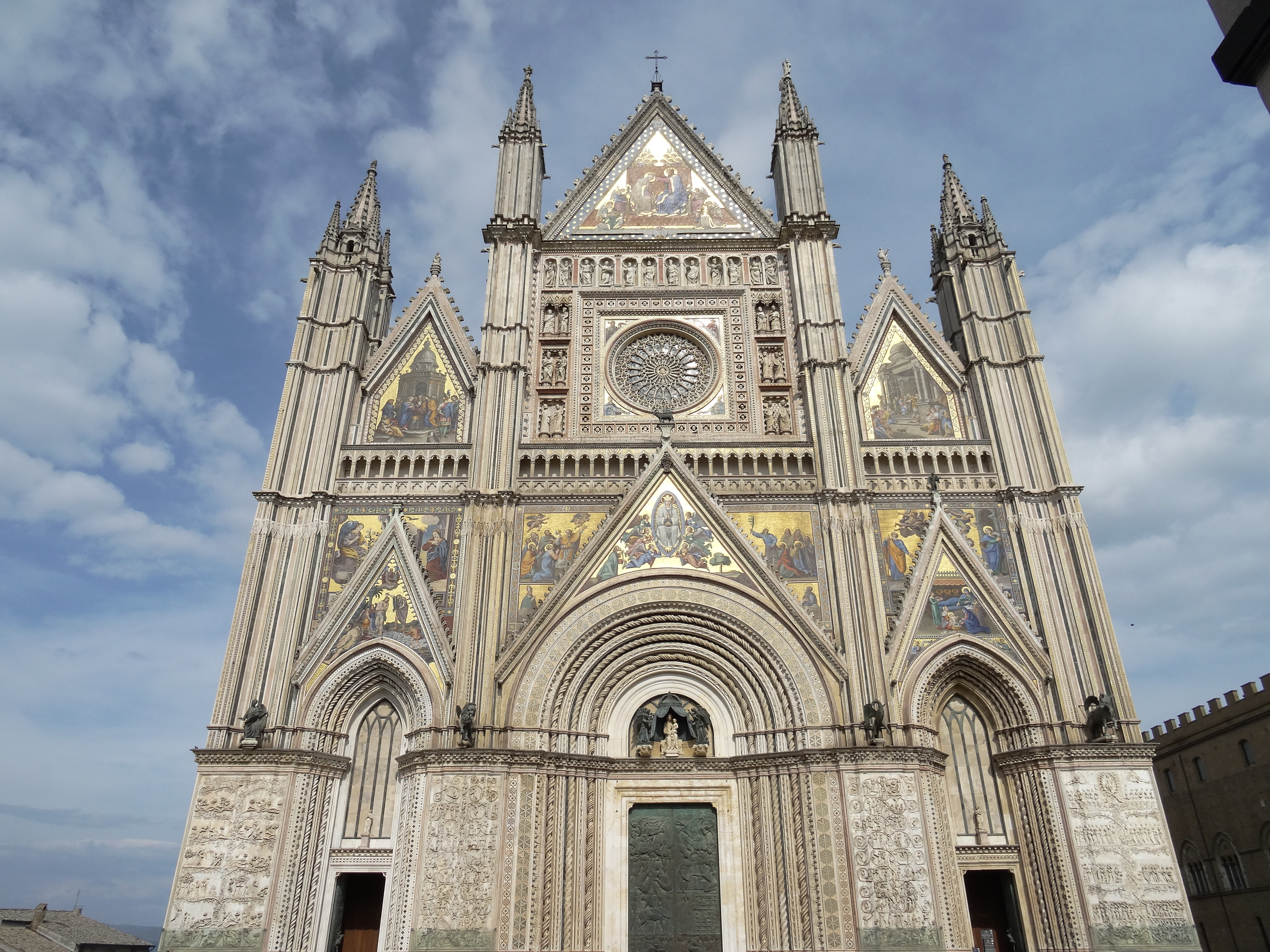 Orvieto